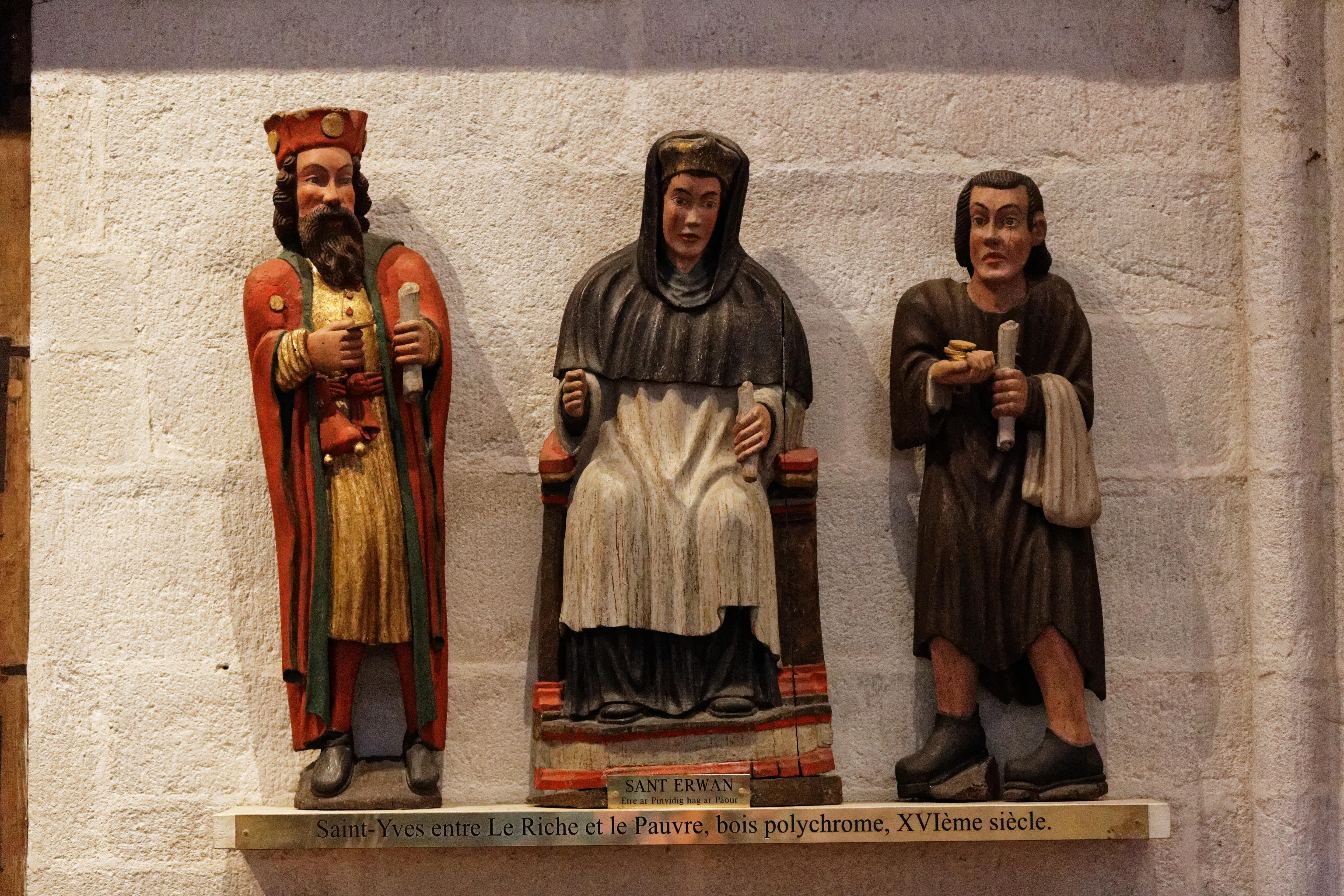 Vue intérieure de la cathédrale Saint-Corentin de Quimper. .